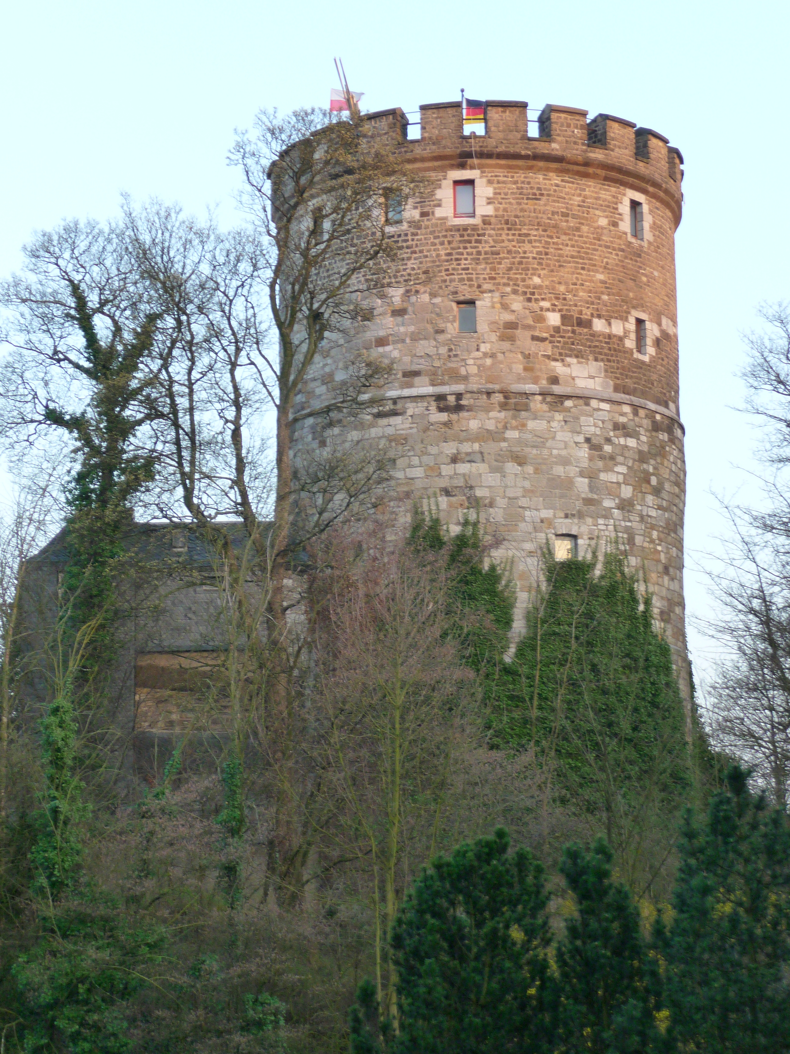 Langer Turm in Aachen